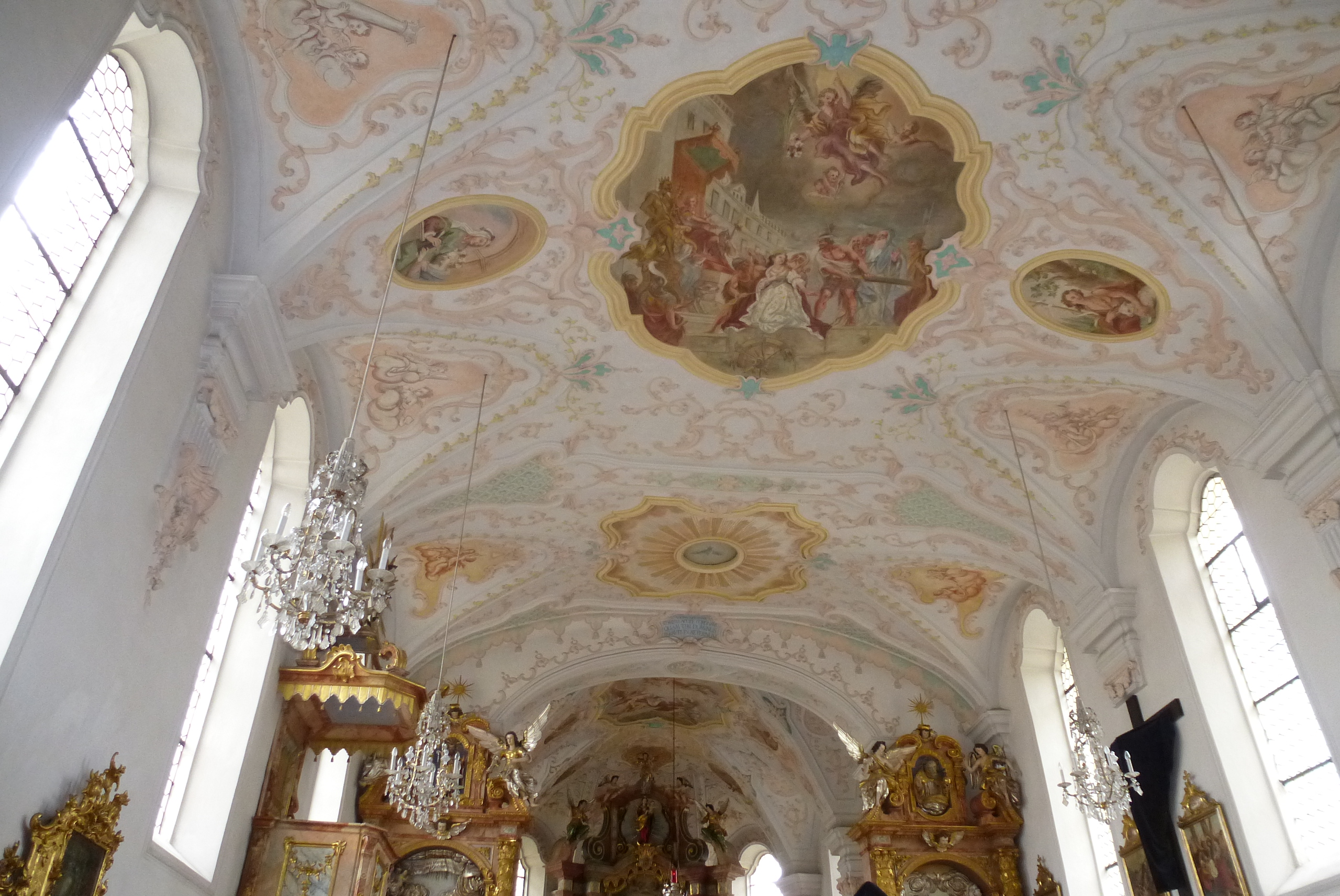 Garching bei München, St.Katharina-Kirche